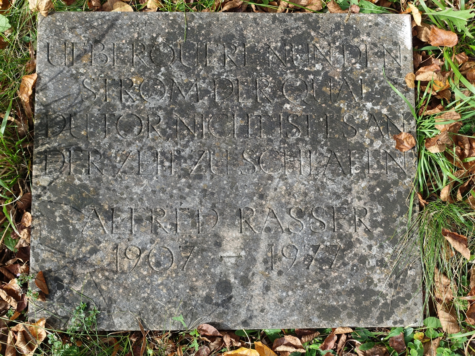 Alfred Rasser (1907-1977) Kabarettist, Prominenten Grabfeld, Friedhof am Hörnli